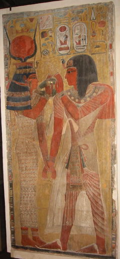 La déesse Hathor accueille Séthi Ier - Antiquité égyptienne, Musée du Louvre, pavillon sully, 2002Source : Greudin